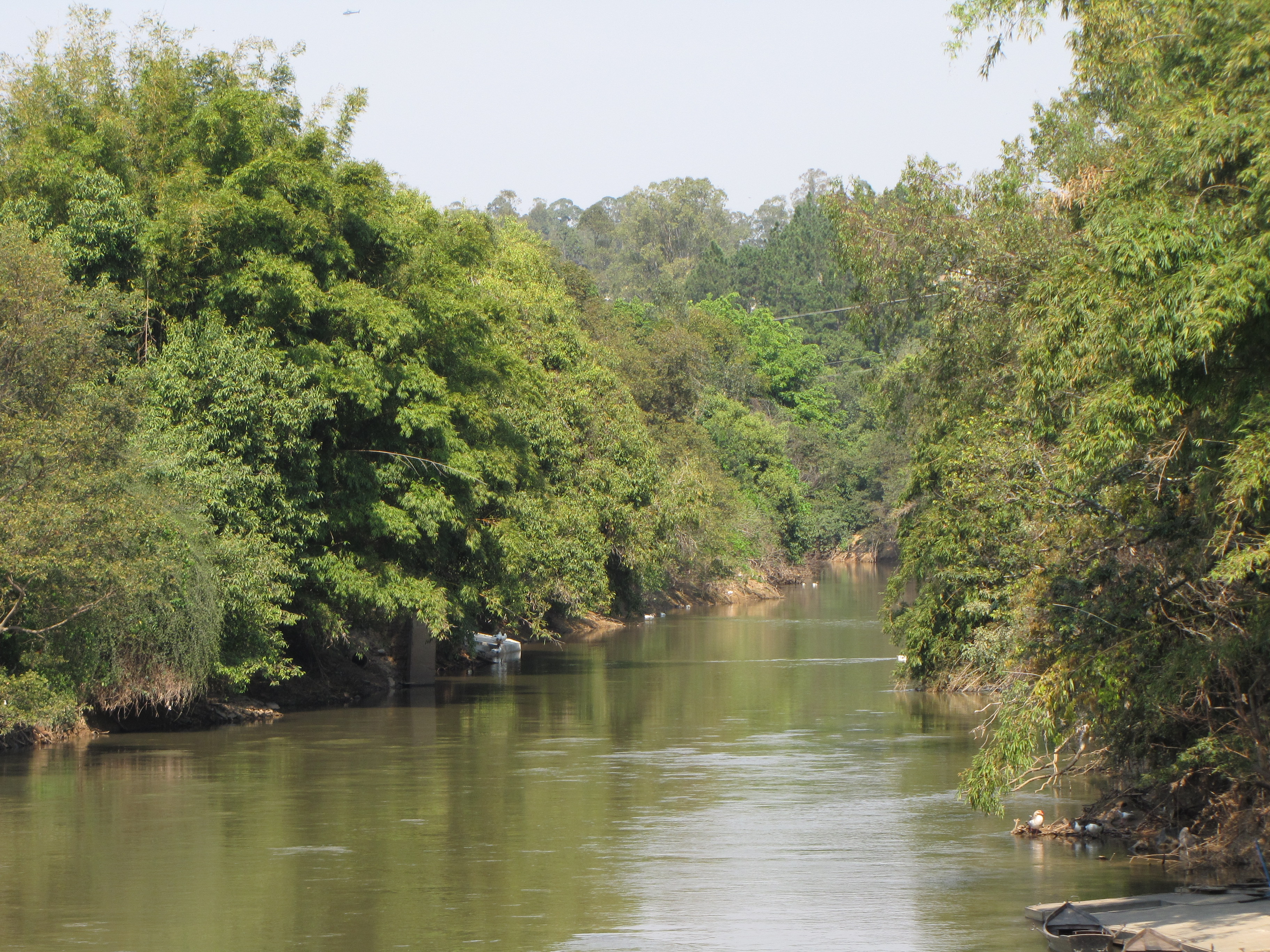 Rio Atibaia.